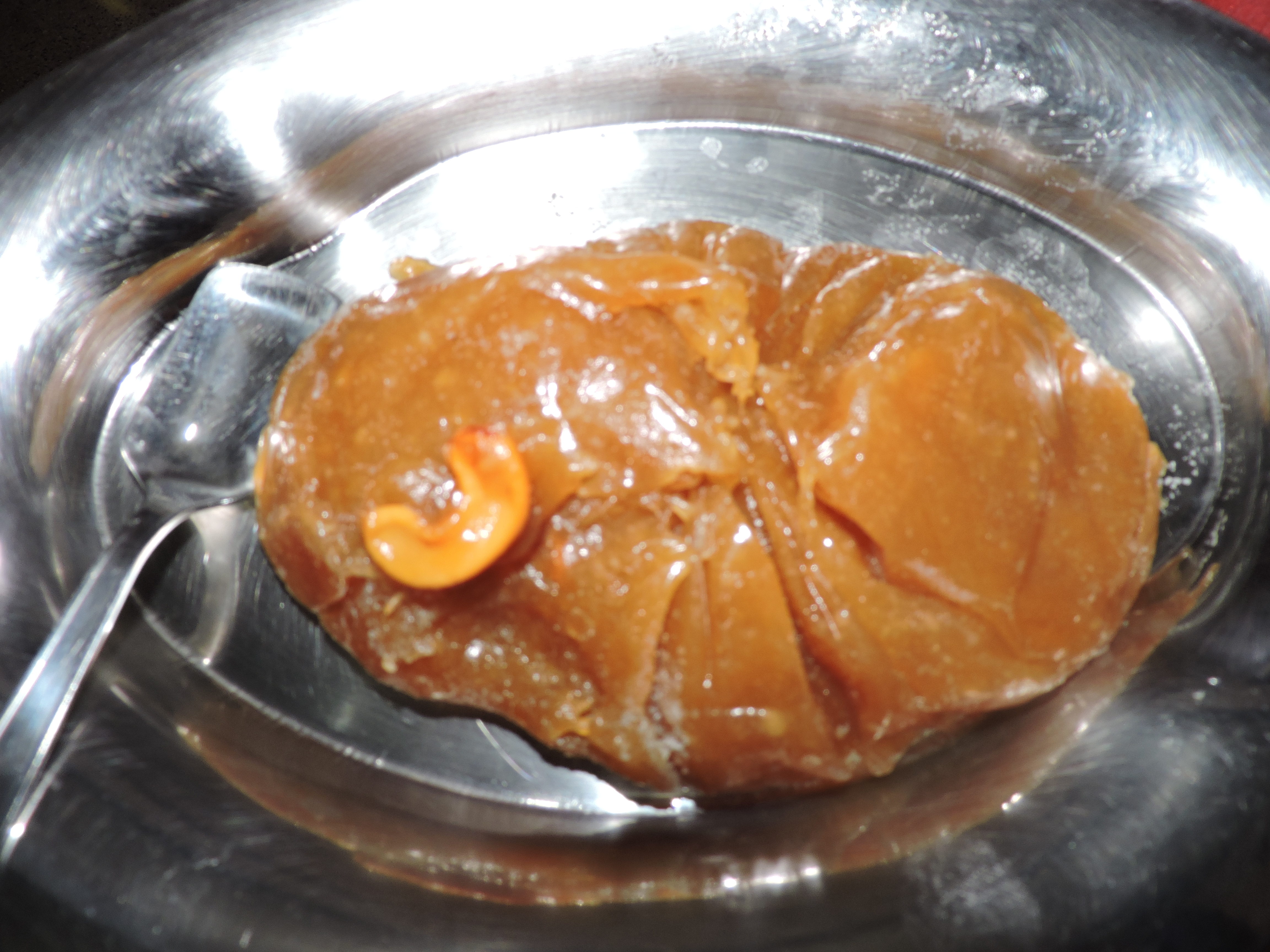 இந்தியாவில் தமிழ்நாட்டில் திருநெல்வேலி மாவட்டத்தில் கோதுமையினால் செய்யப்படும் பிரபலமான இனிப்பு வகை .